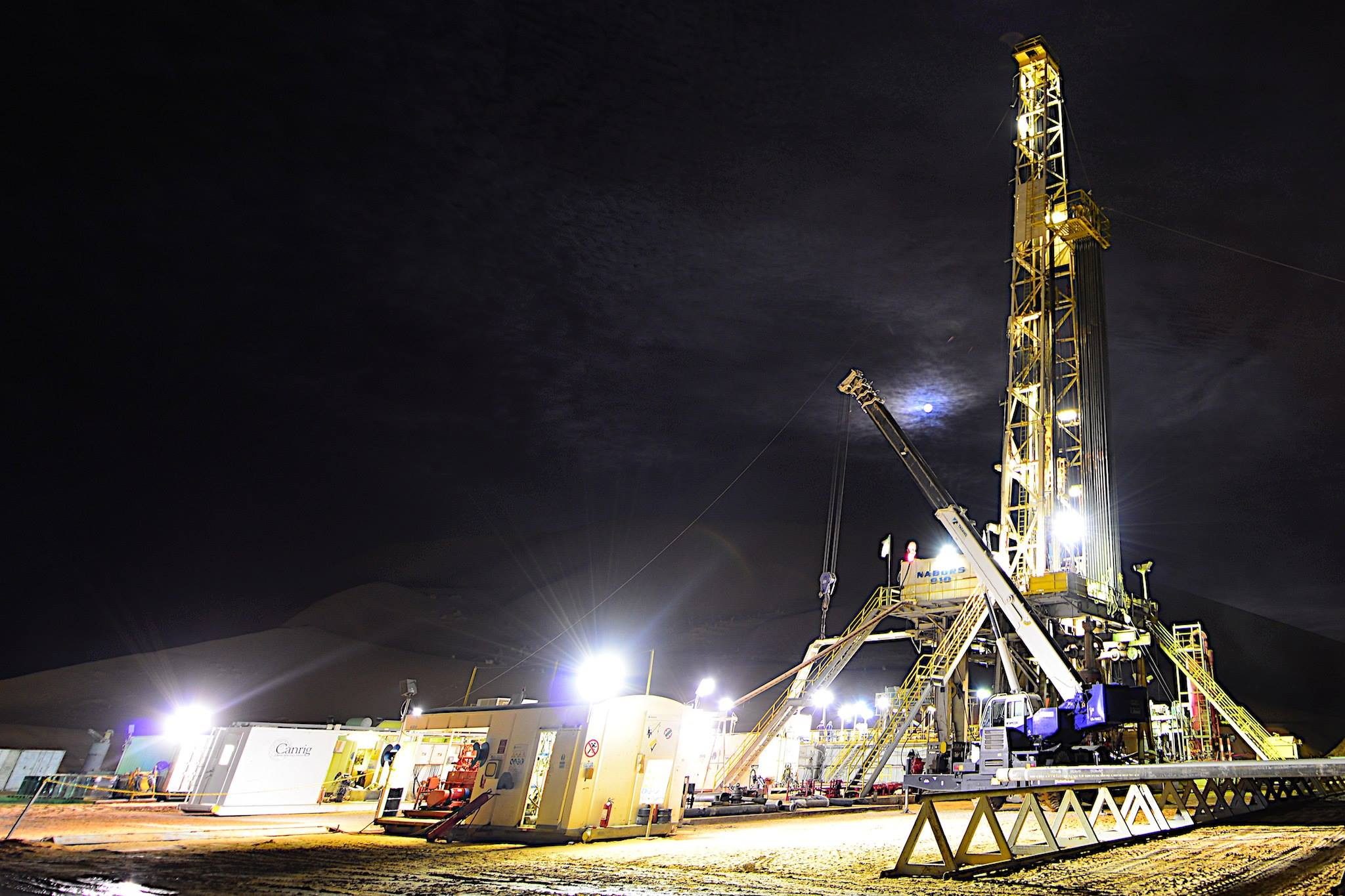 Rig 810 at night